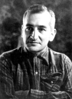 Foto publicada en "Hora Cero semanal" el 4 de septiembre de 1957